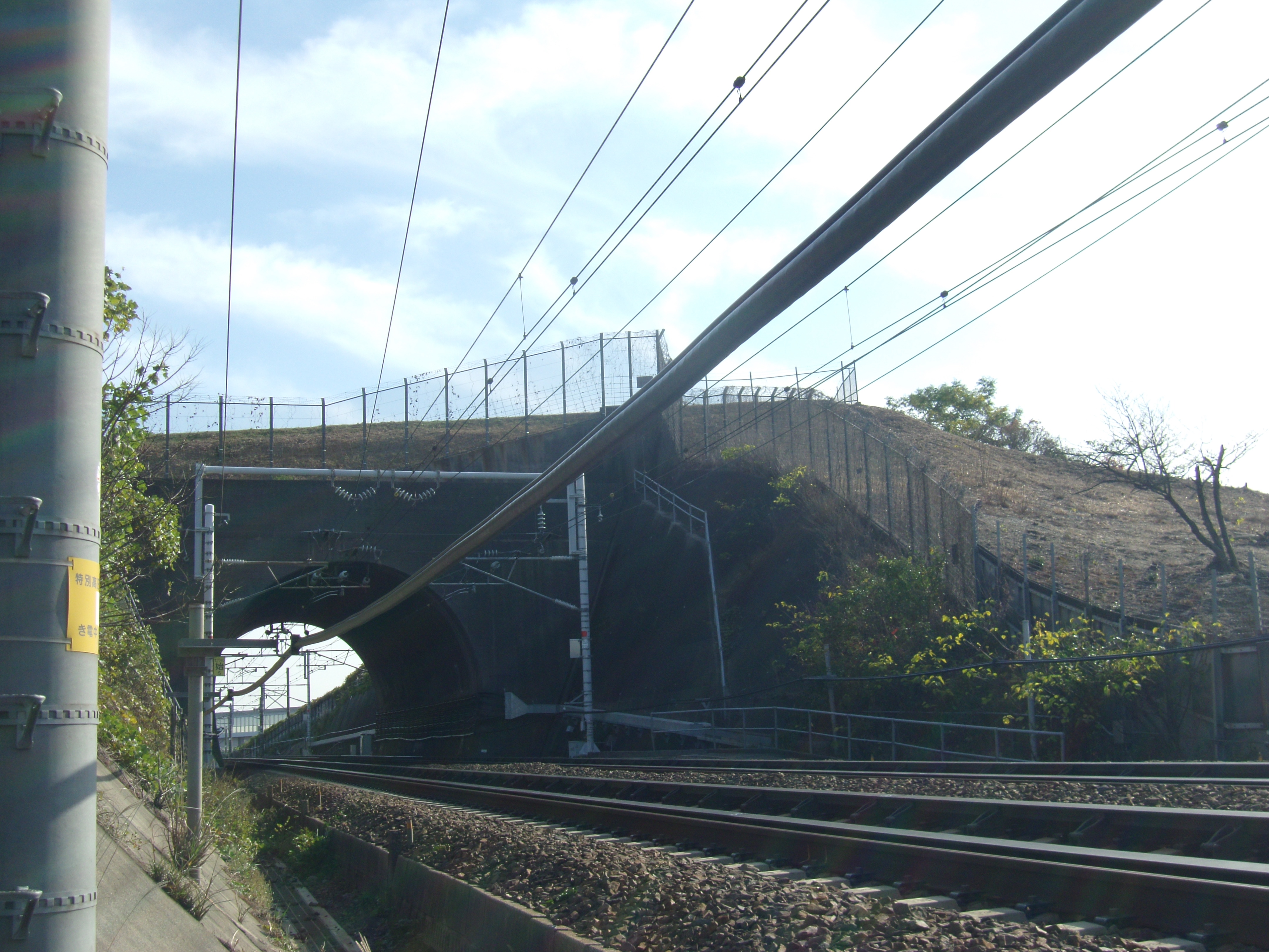 愛知用水が東海道新幹線の路線上を乗り越える水道橋、新幹線としては大高トンネルになる